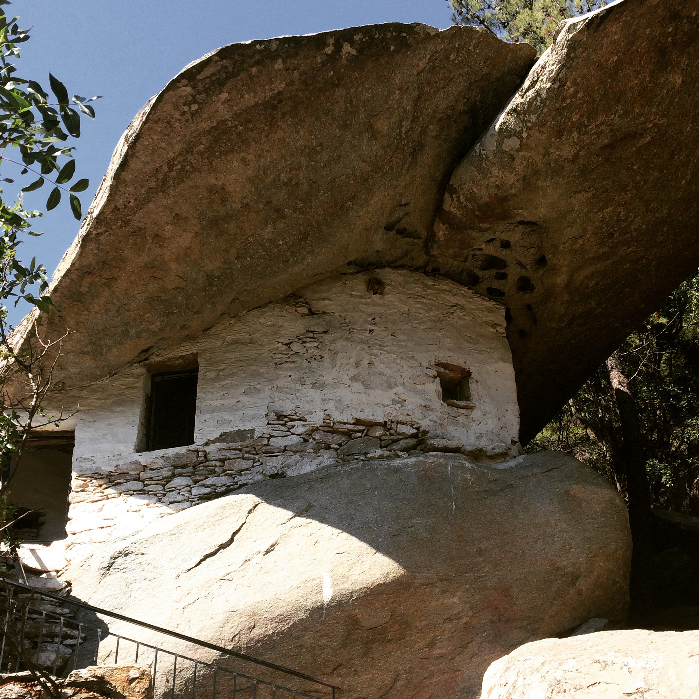 Μονή Οσίας Θεοκτίστης και Παρεκκλήσι Θεοσκέπαστης«Μονή Οσίας Θεοκτίστης και Παρεκκλήσι Θεοσκέπαστης»